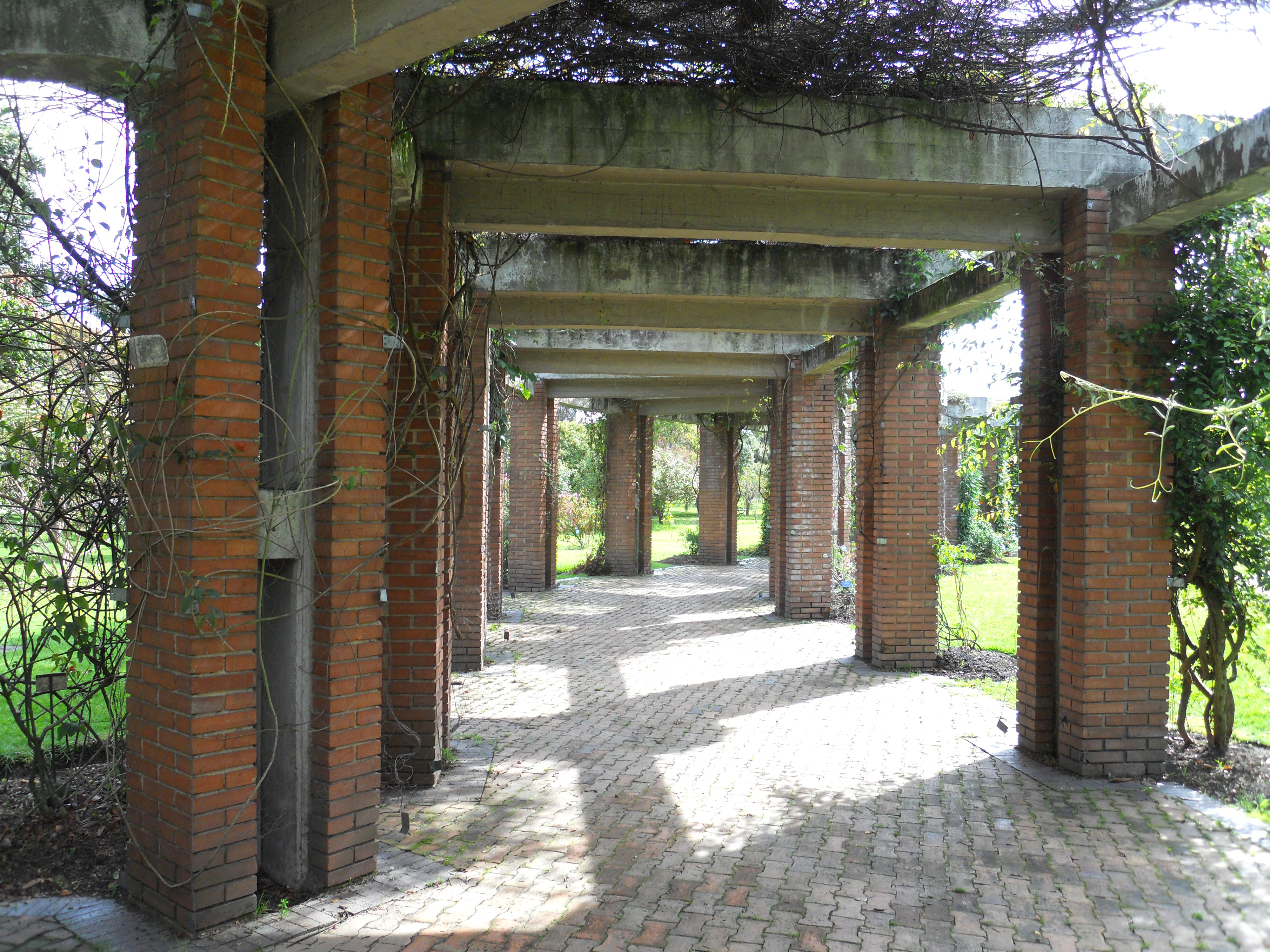 Bogotá, estructura de cemento y ladrillo en el Jardín Botánico.